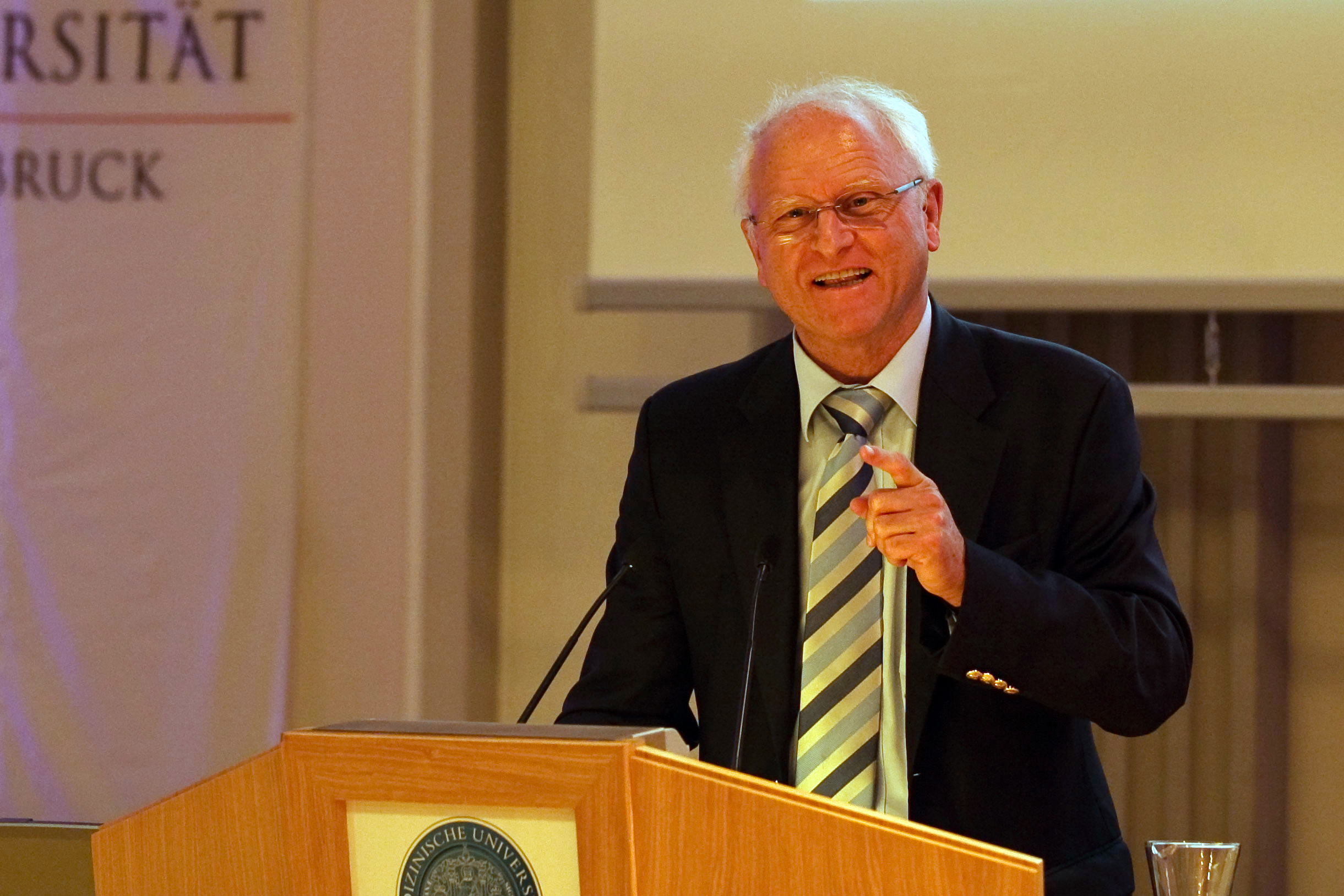 Univ-Prof. Dr. Raimund Margreiter